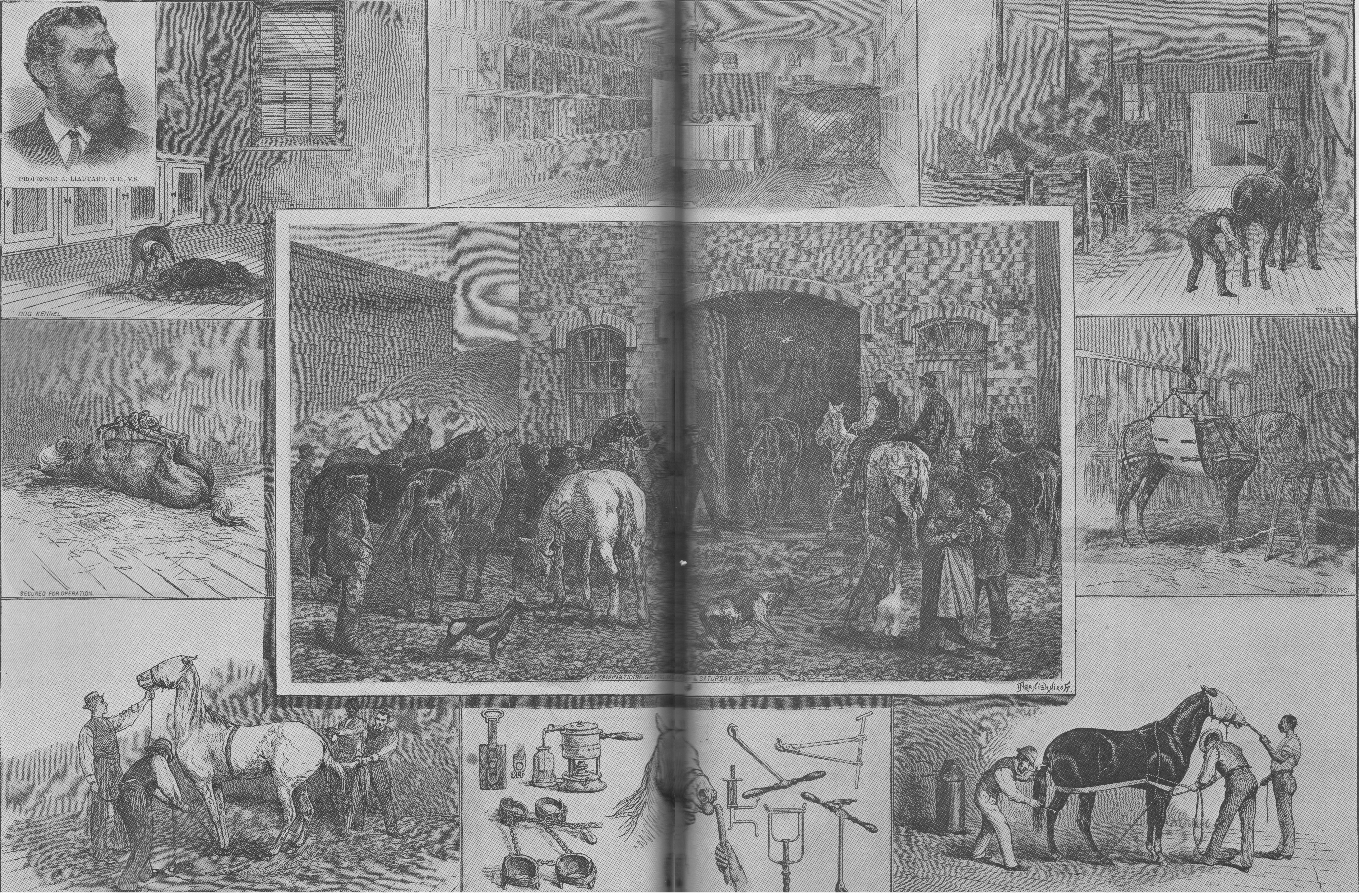 Scènes de la clinique de l'American Veterinary College, dans New York City, vers 1880. L’hôpital et le college étaient privés et la propriété d'Alexandre Liautard, enseignant et praticien vétérinaire. Date Vers 1880